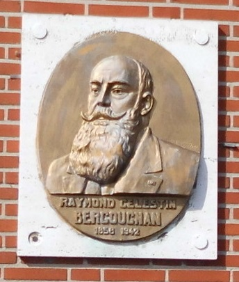 Raymond Bergougnan - Wijmenstraat - Belzele - Evergem - Oost-Vlaanderen - België